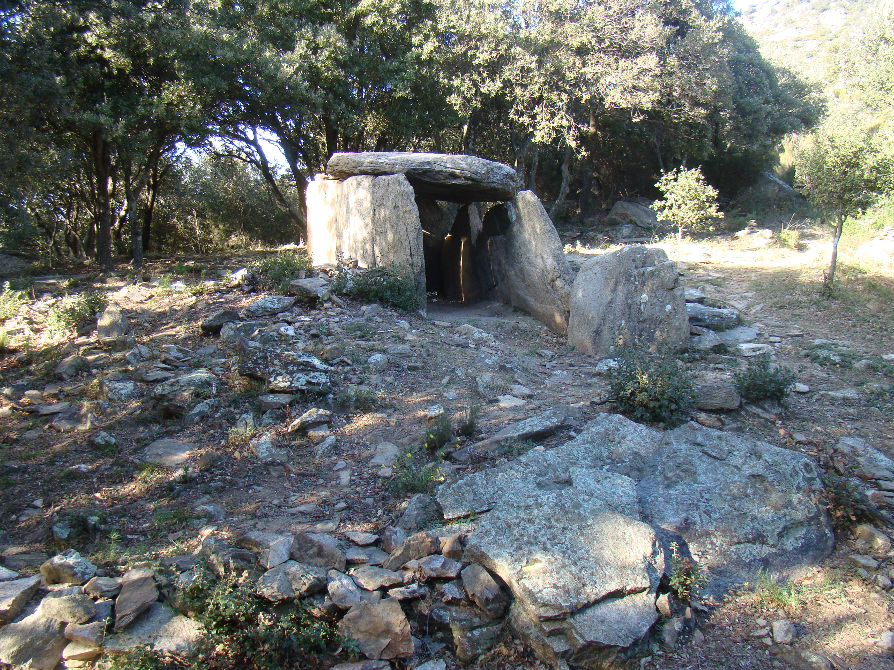 Dolmen de Balma de Na Cristiana vu du sud avec son tumulus